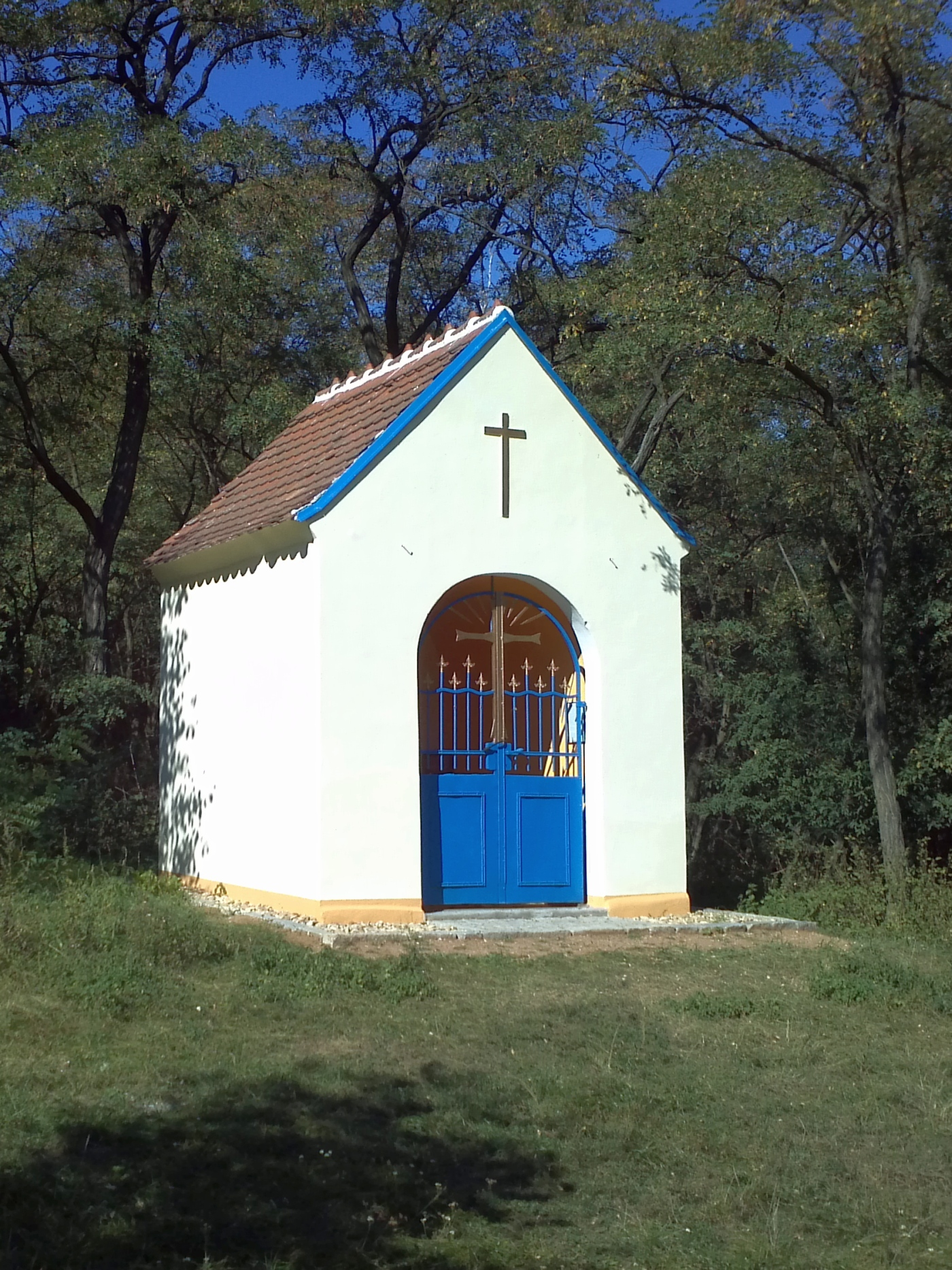 Kaple sv. Peregrina SV nad Ořechovem